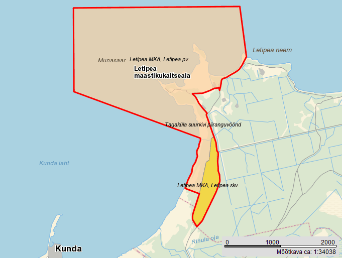 Letipea MKA kaart. Põhineb Maa-ameti kaardil.